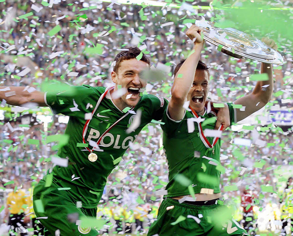 Sascha Riether feiert den Gewinn der Deutschen Meisterschaft 2008/09